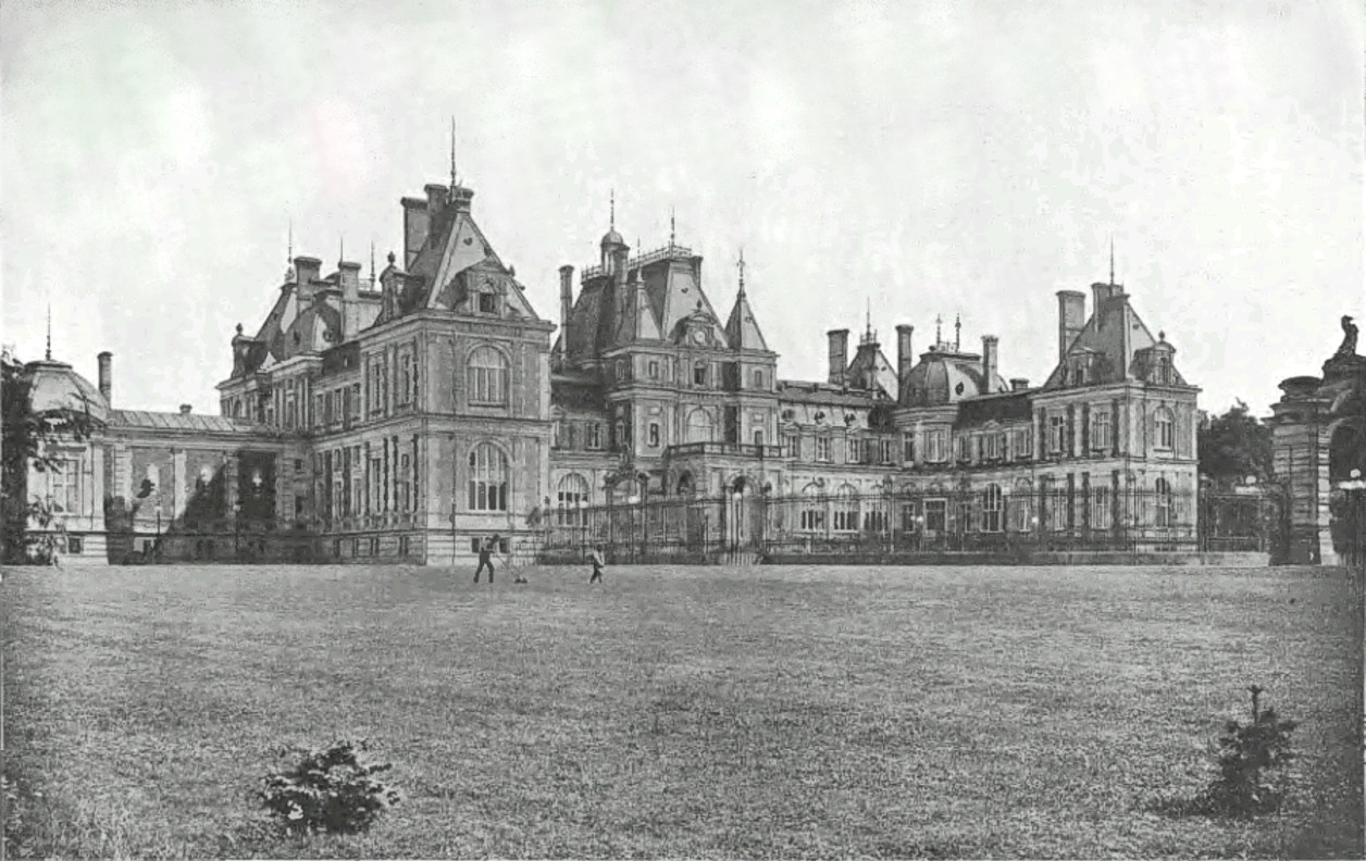 Das Neue Schloss zu Neudeck.